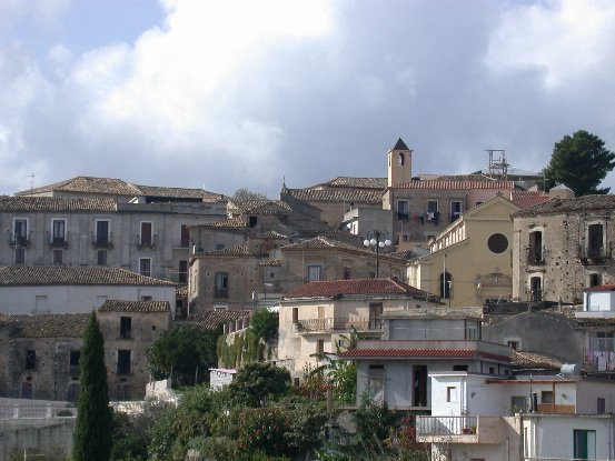 VistaSidernoSuperiore